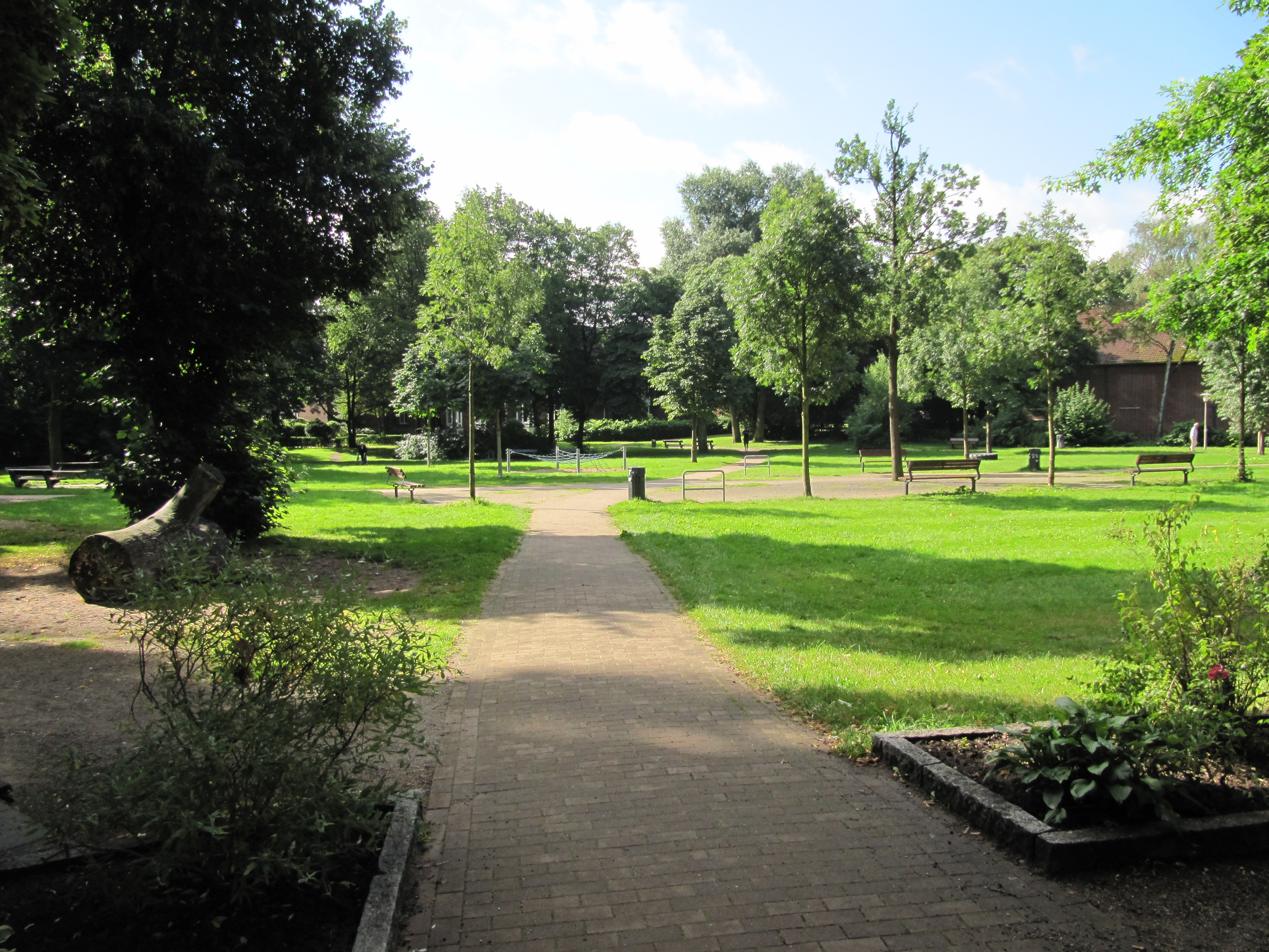 Von-Dratelnscher-Park in Hamburg-Horn